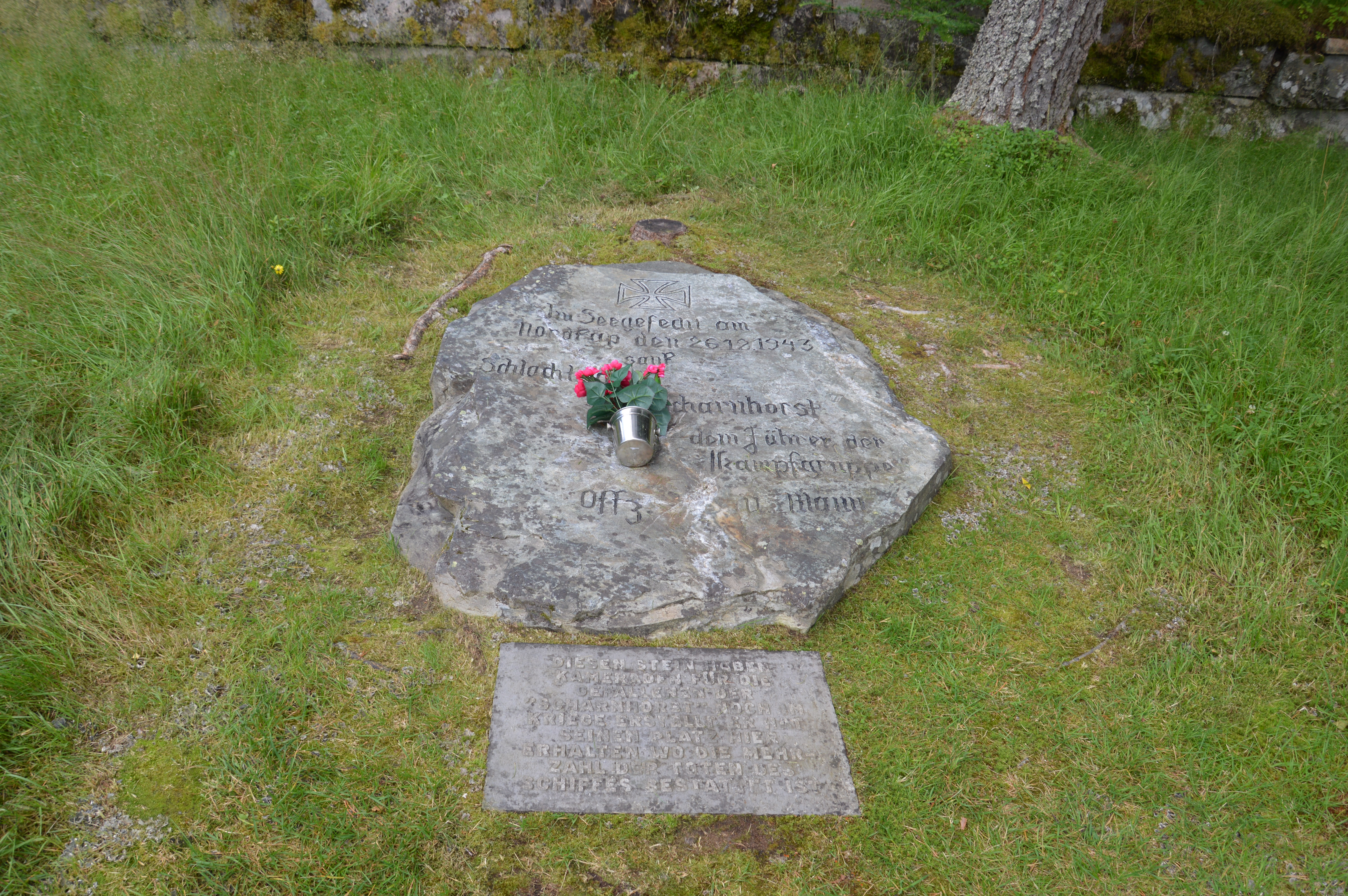 German churchyard in Botn, Saltdal, Norway